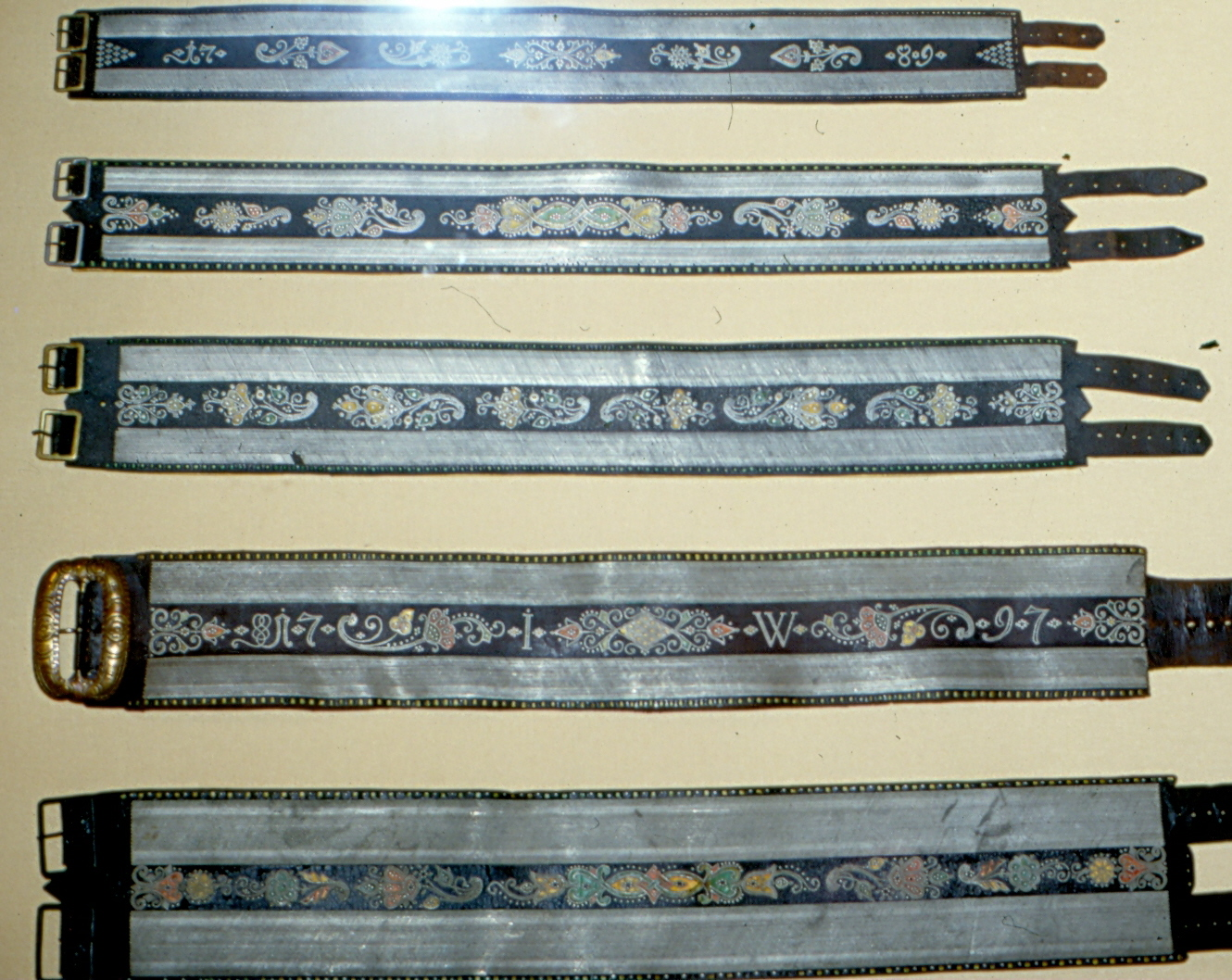 mehrere Zinngürtel mit verschiedenen Ornamenten. Quelle Sammlung Martin - auch abgebildet im Buch "MANNSGURTEN" ISBN 3-925249-42-7. Eigene Fotografie mit Genehmigung des Besitzers